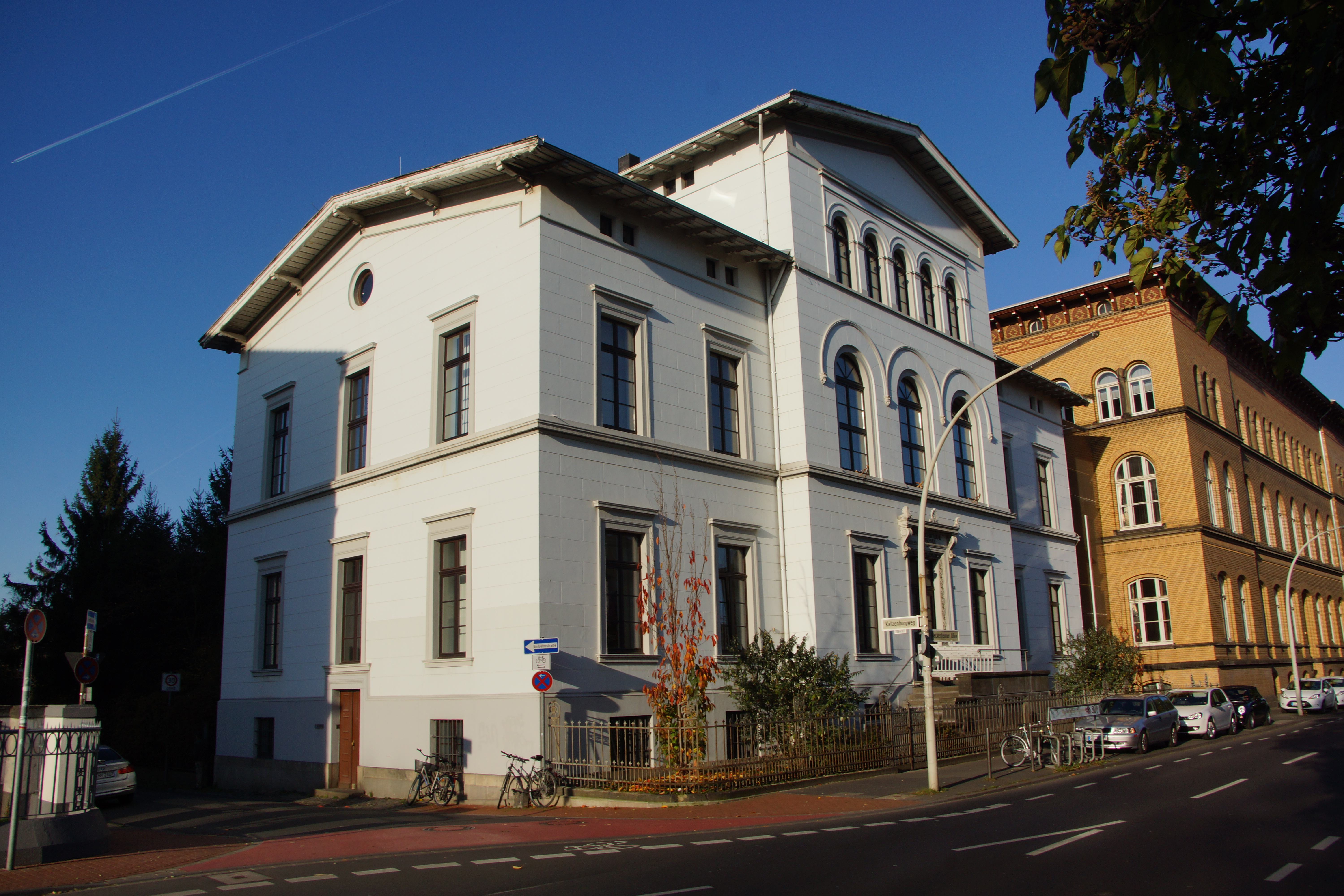 Gebäude der Landwirtschaftlichen Hochschule Poppelsdorf, Meckenheimer Allee 174 (Ecke Katzenburgweg), Bonn-Poppelsdorf